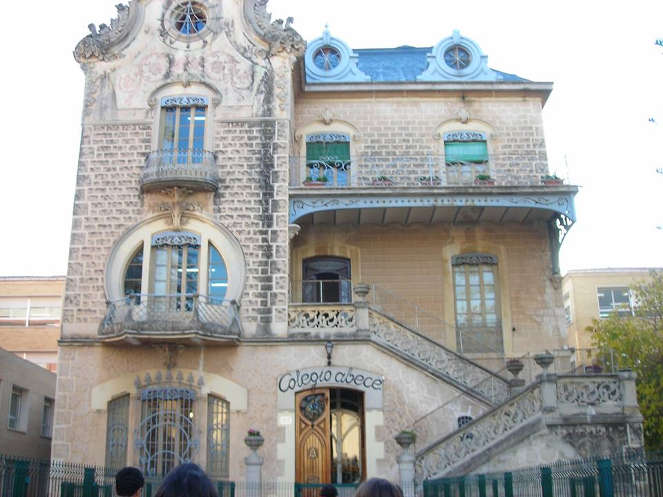 Palauet Paris, en l'Avinguda del Grau número 36 de Gandía (Valéncia). Edifici moderniste obra de l'arquitecte Víctor Beltrí, 1908.